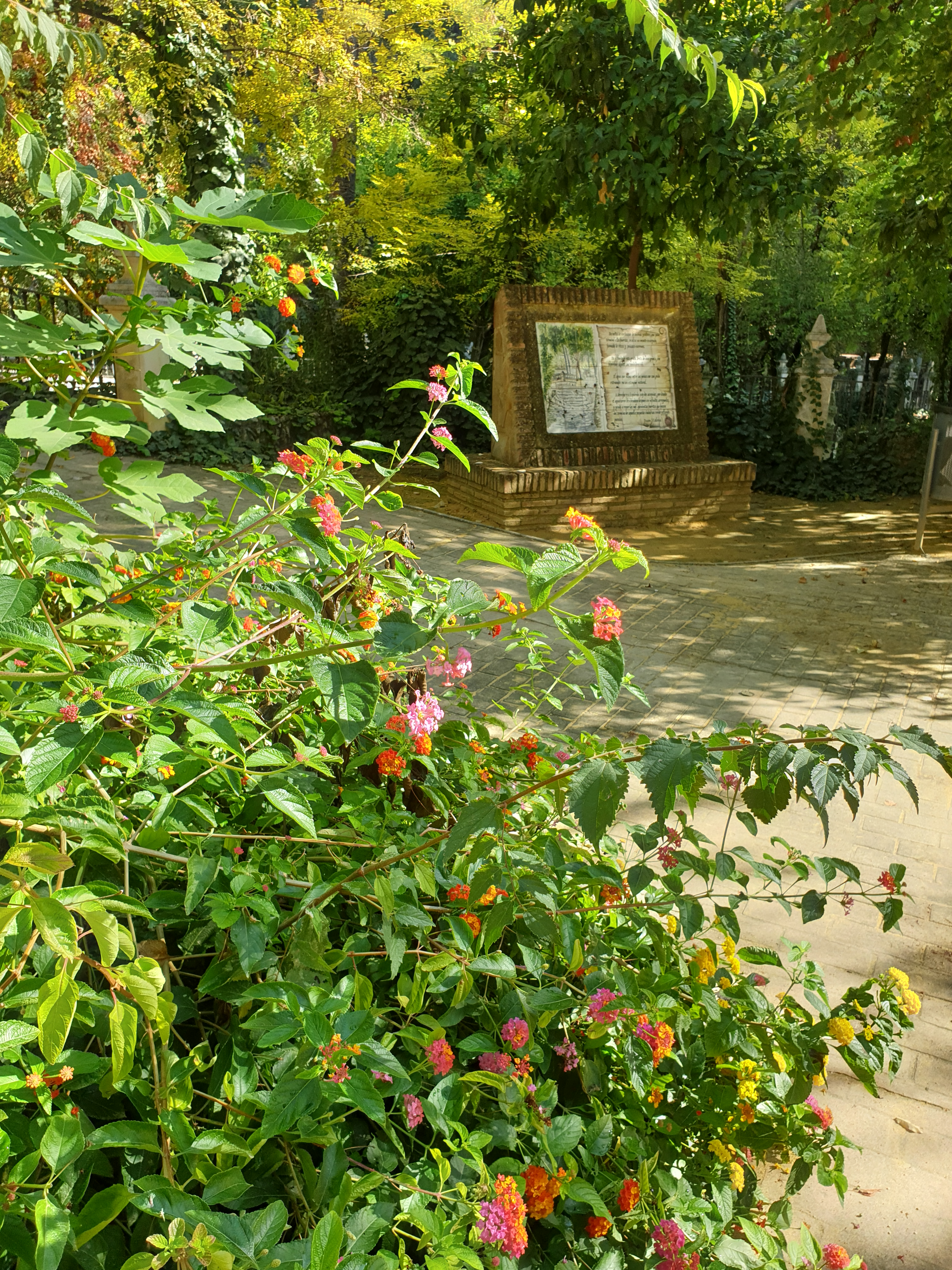 Fuente del Río 4